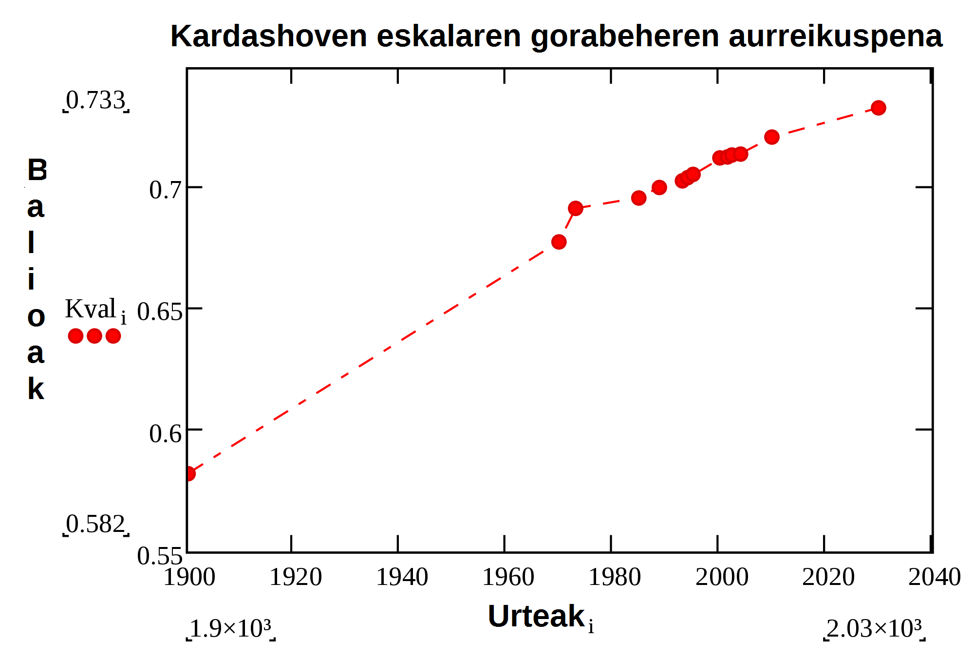 Kardashoven eskala. Etorkizunean eskalan izango diren gorabeheren aurreikuspena azaltzen du.